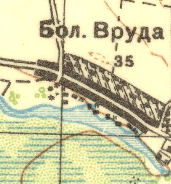 Топографическая карта Ленинградской области, квадрат О-35-23-В (Хотыницы), деревня Большая Вруда